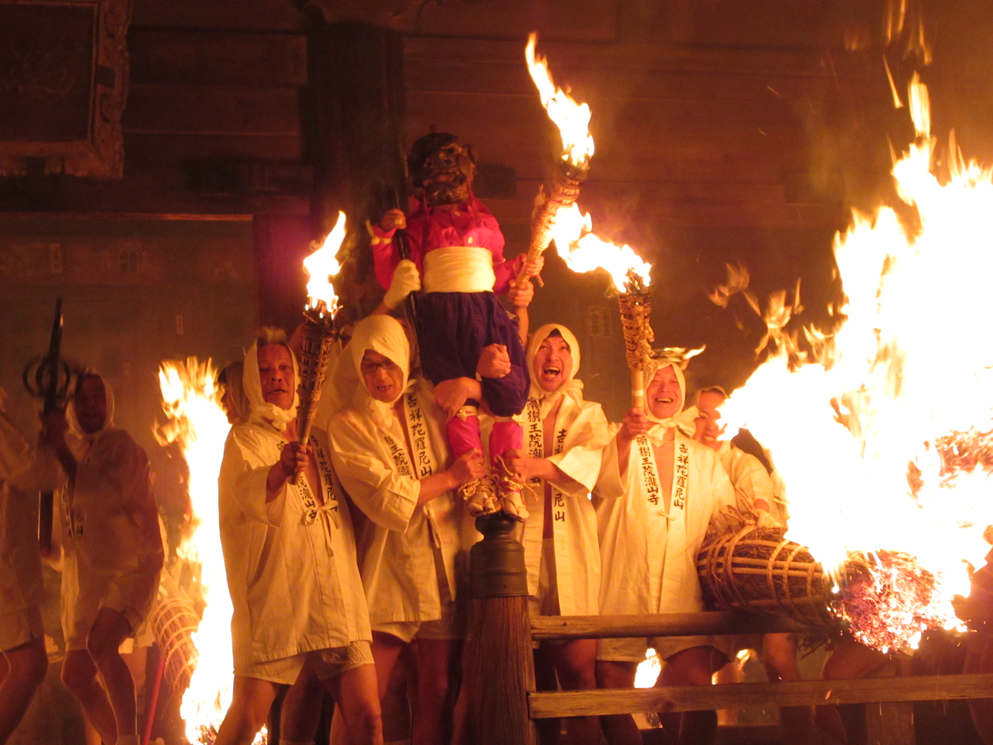 滝山寺鬼まつり（岡崎市滝町）